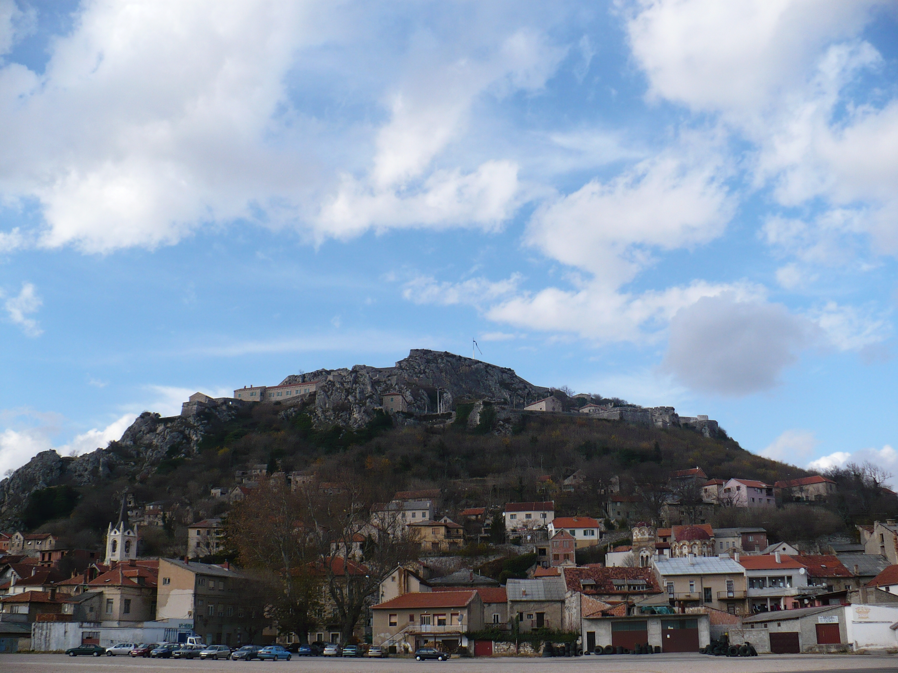 Kninska tvrđava u gradu Kninu.